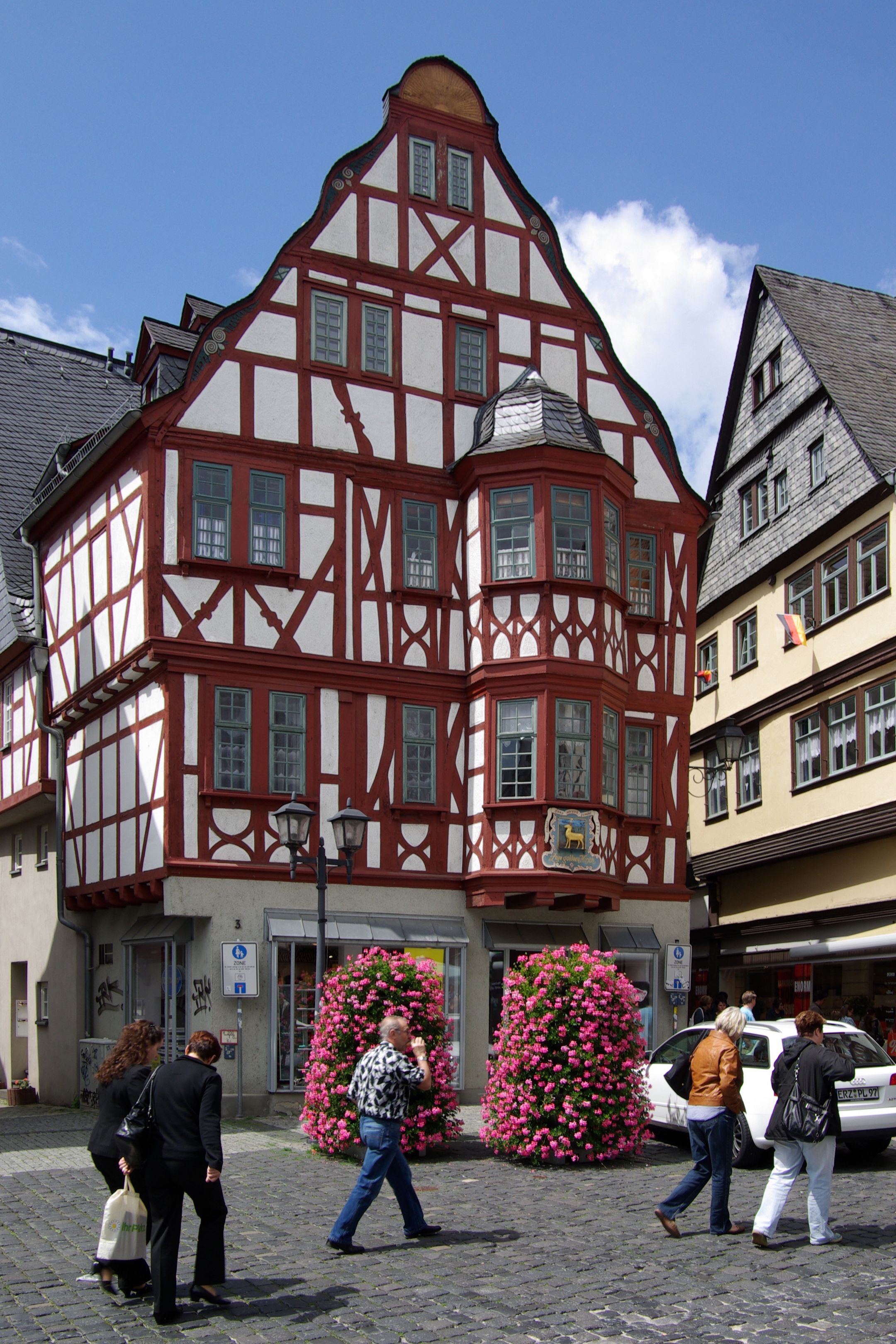 Limburg an der Lahn, Kornmarkt 3, Gasthaus „Zum goldenen Hirsch“, gebaut 1527